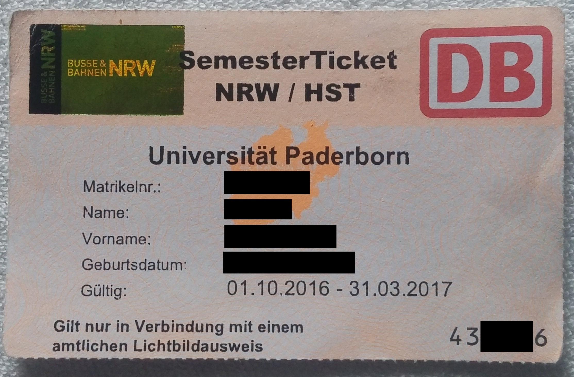 Semesterticket NRW/HST, Universität Paderborn